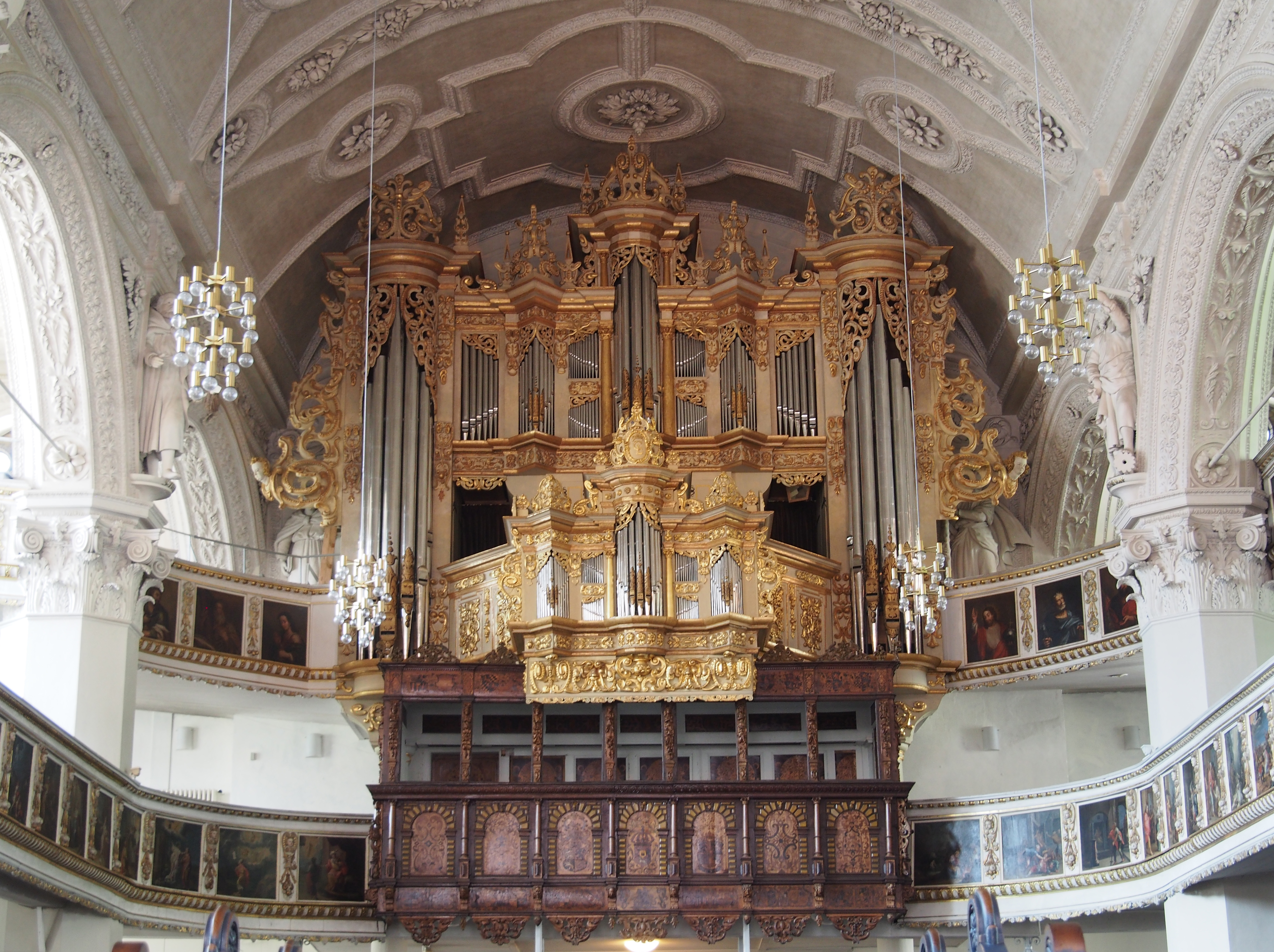 Innenraum mit Orgel der Stadtkirche St. Marien in Celle (Niedersachsen)